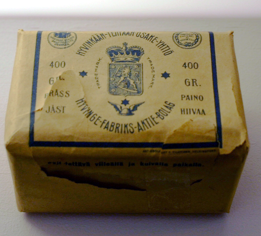 Hyvinkään Tehtaan Oy:n hiivapaketti tehdasmuseossa